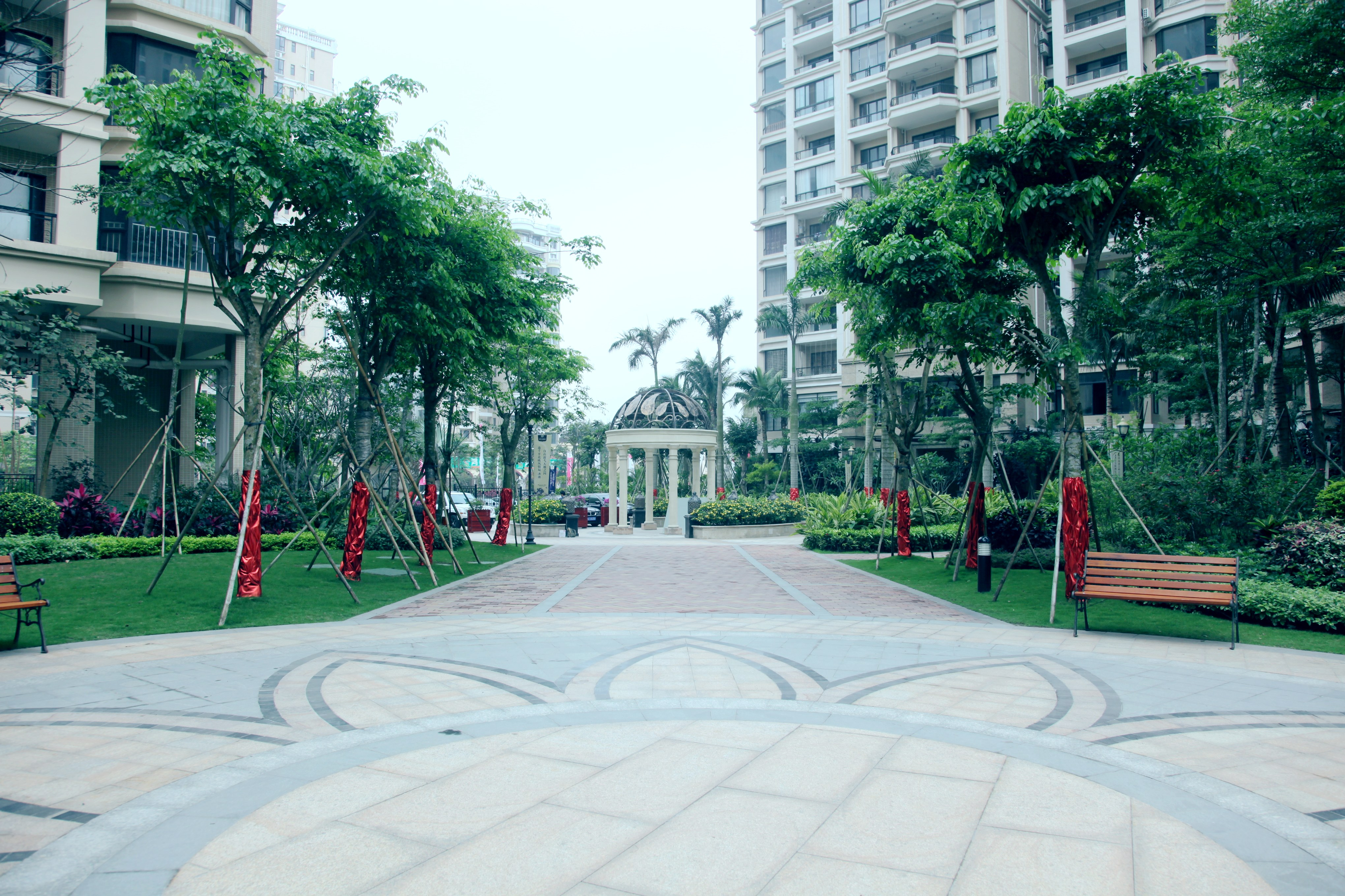 海南国际旅游岛——滨江帝景景观（南向）